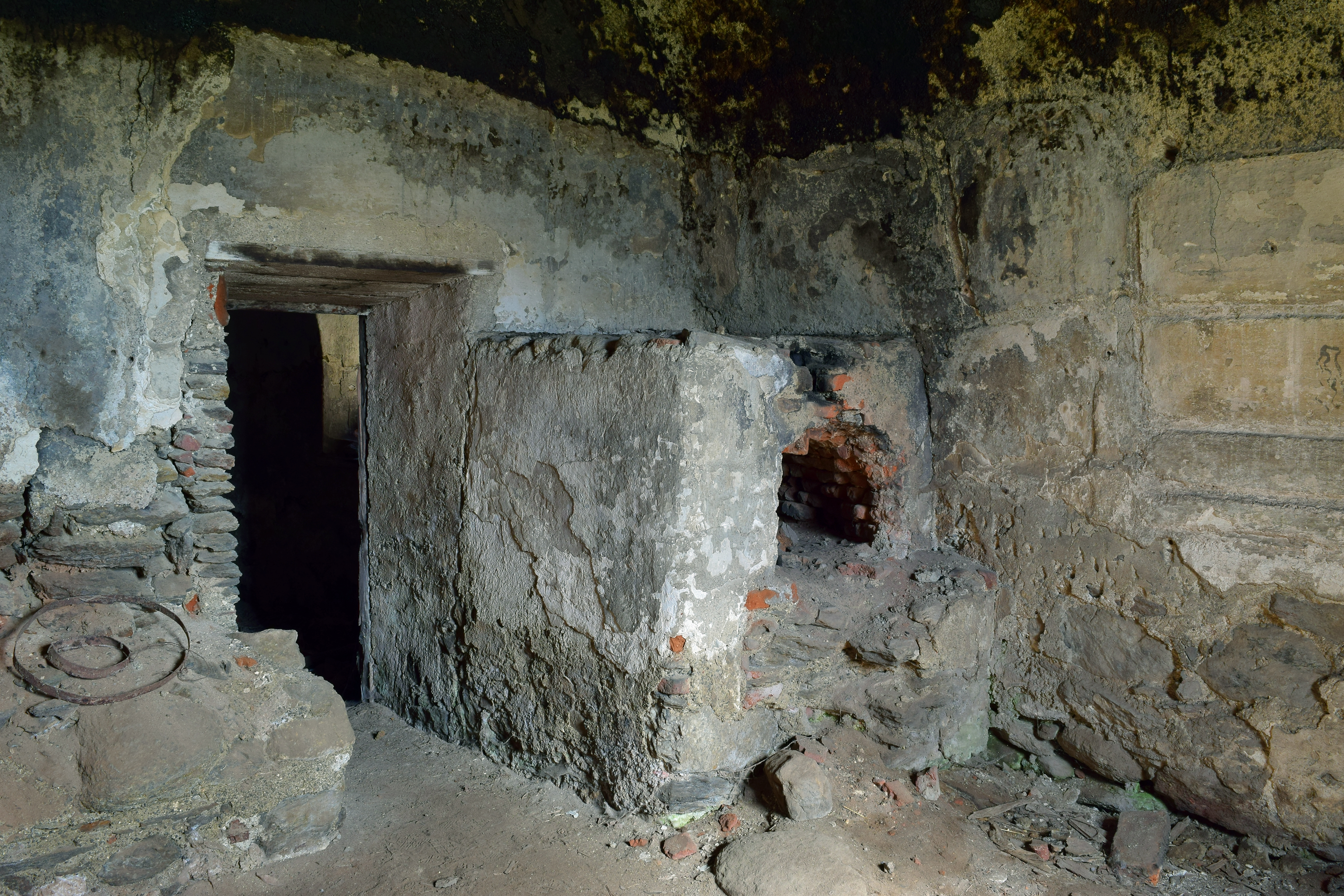 Ein Hinterladerkachelofen in Schloss Hanfelden in Unterzeiring. Der Ofen wurde von der Rückseite beschickt. Dieses Bild wurde anlässlich des österreichischen Tags des Denkmals 2018 in der Steiermark eingereicht.